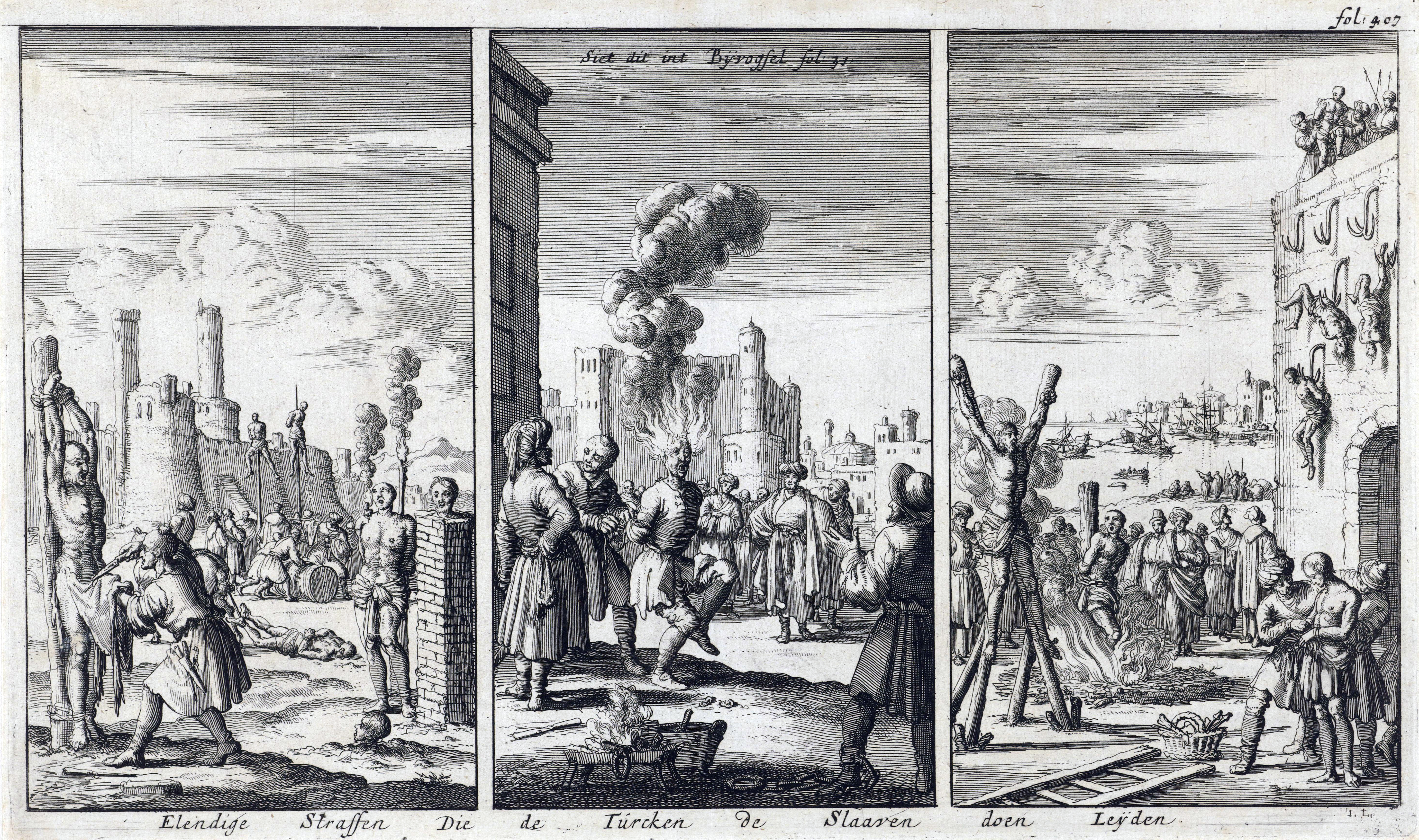 Zware mishandeling van christenslaven door de Turken, Jan Luyken, 1684